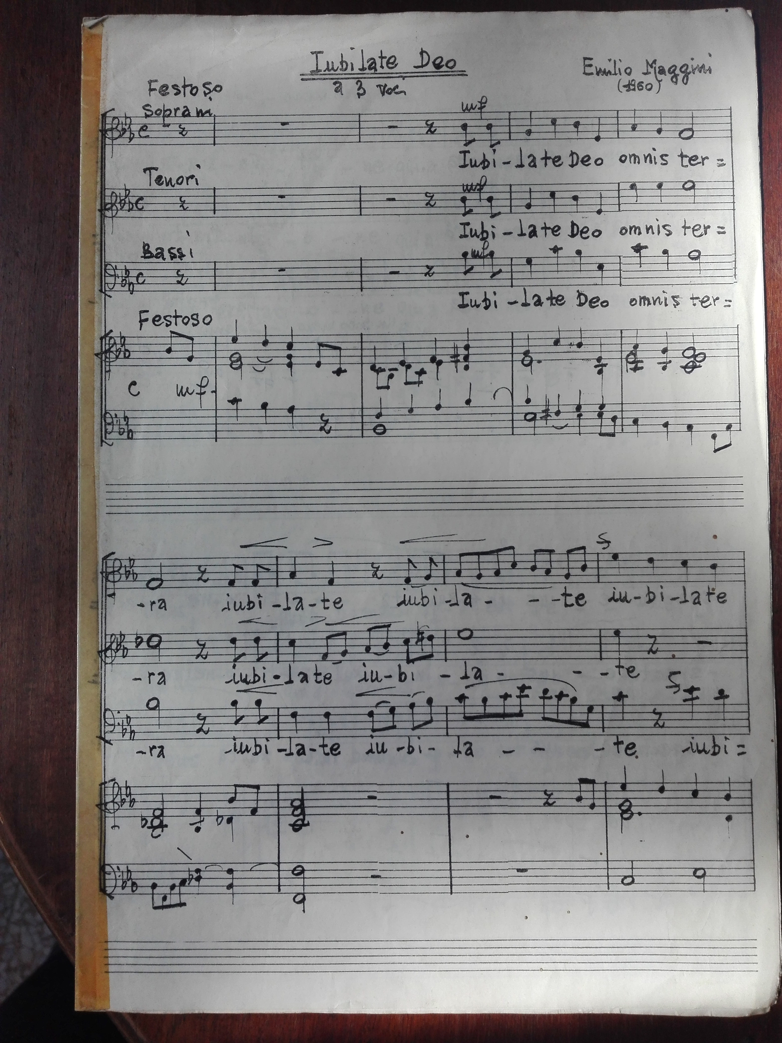 Manoscritto di Emilio Maggini all'Istituto Diocesano Baralli di Lucca